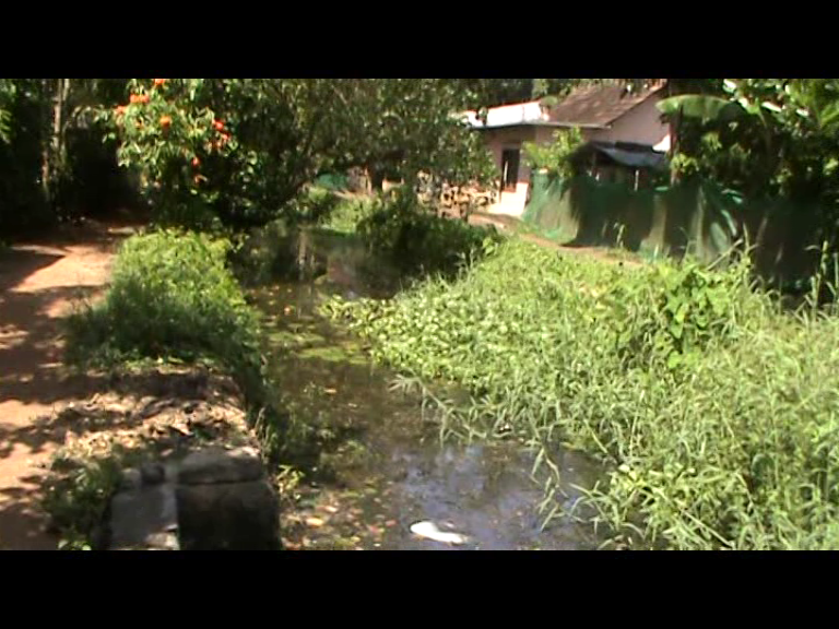 a village canal in the nadubhagom watershed in nedumudy,kuttanad